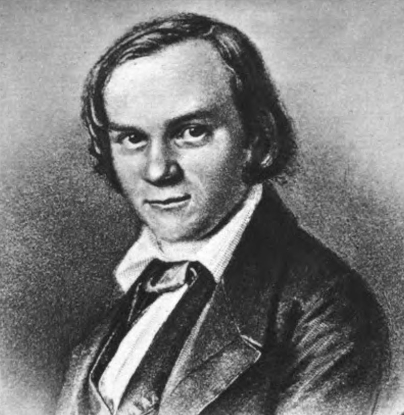 Heinrich Kiepert, Bildnis von 1842.